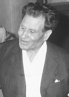 Immagine di Frank Coppola